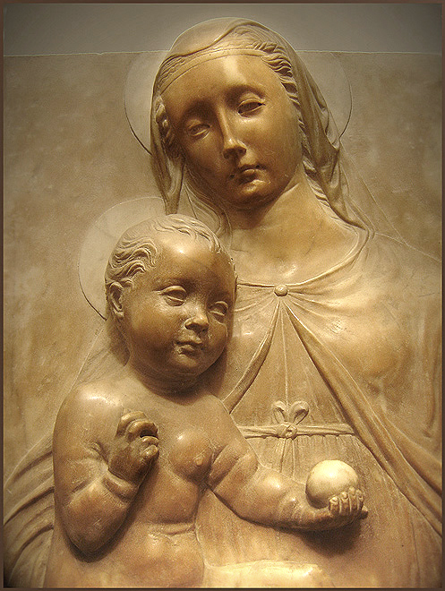 Madonna, atribuída a Pagno di Lapo Portigiani. Museo dell'Opera del Duomo, Florença.